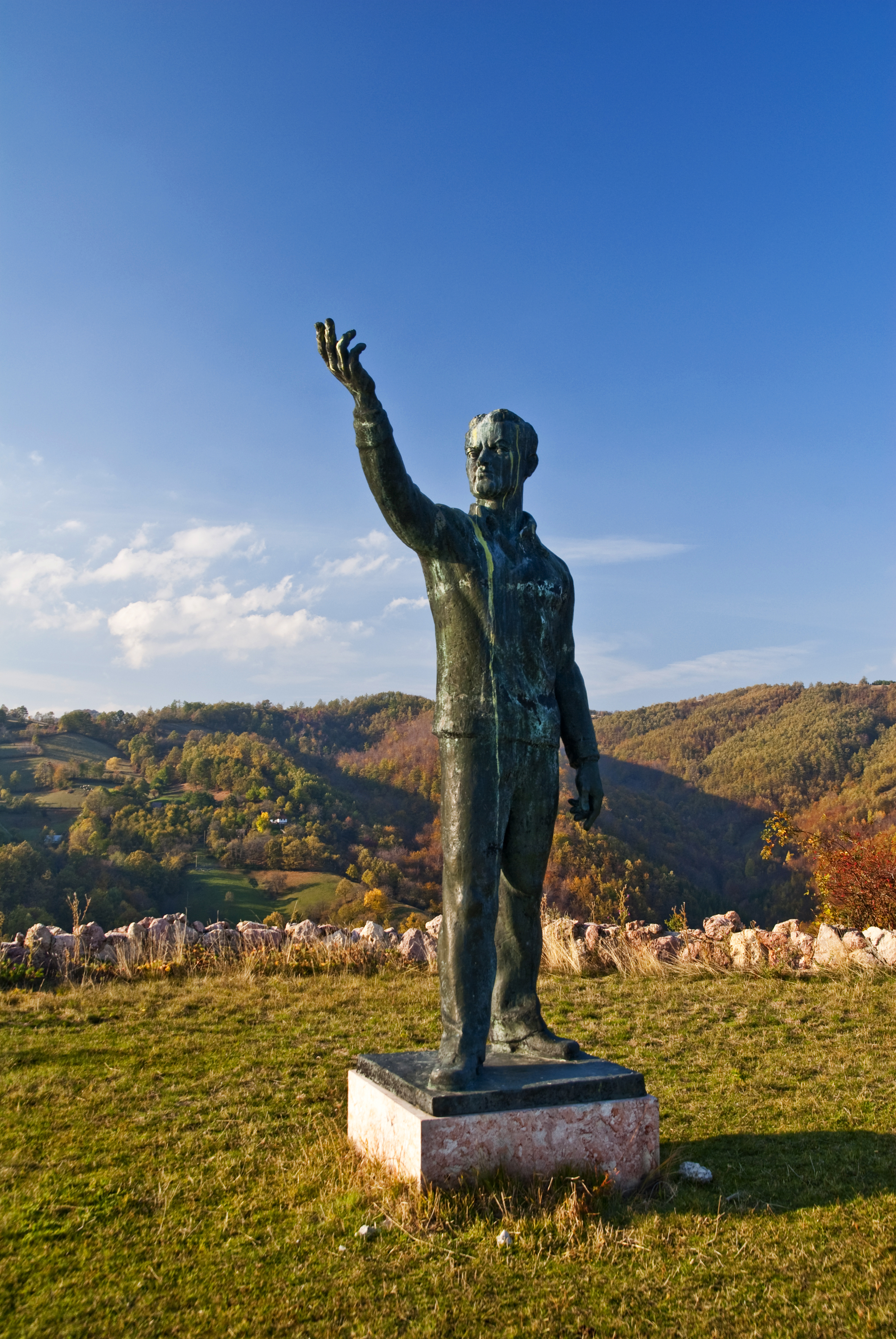 Spomen obeležje u Radanovcima na mestu gde je ubijen Narodni heroj Žikica Jovanović Španac